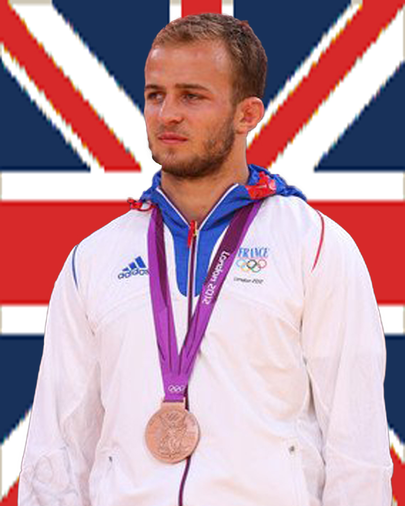 Ugo Legrand 3ème aux Jeux Olympique de Judo à Londres 2012